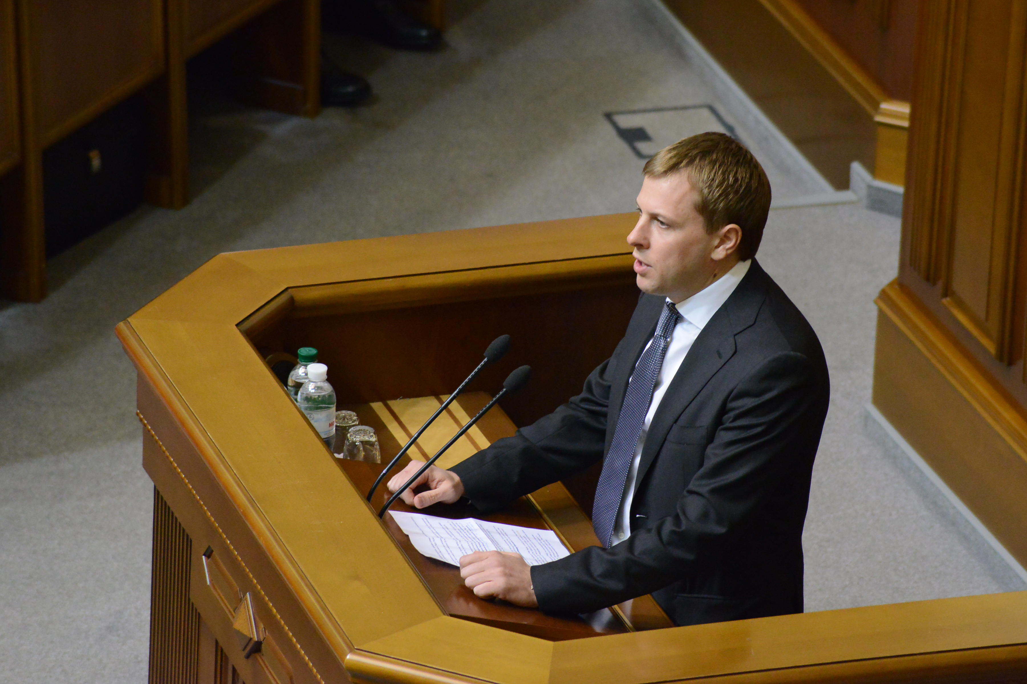 ВЕРХОВНА РАДА УКРАЇНИ 2015 фотограф Вадим Чуприна